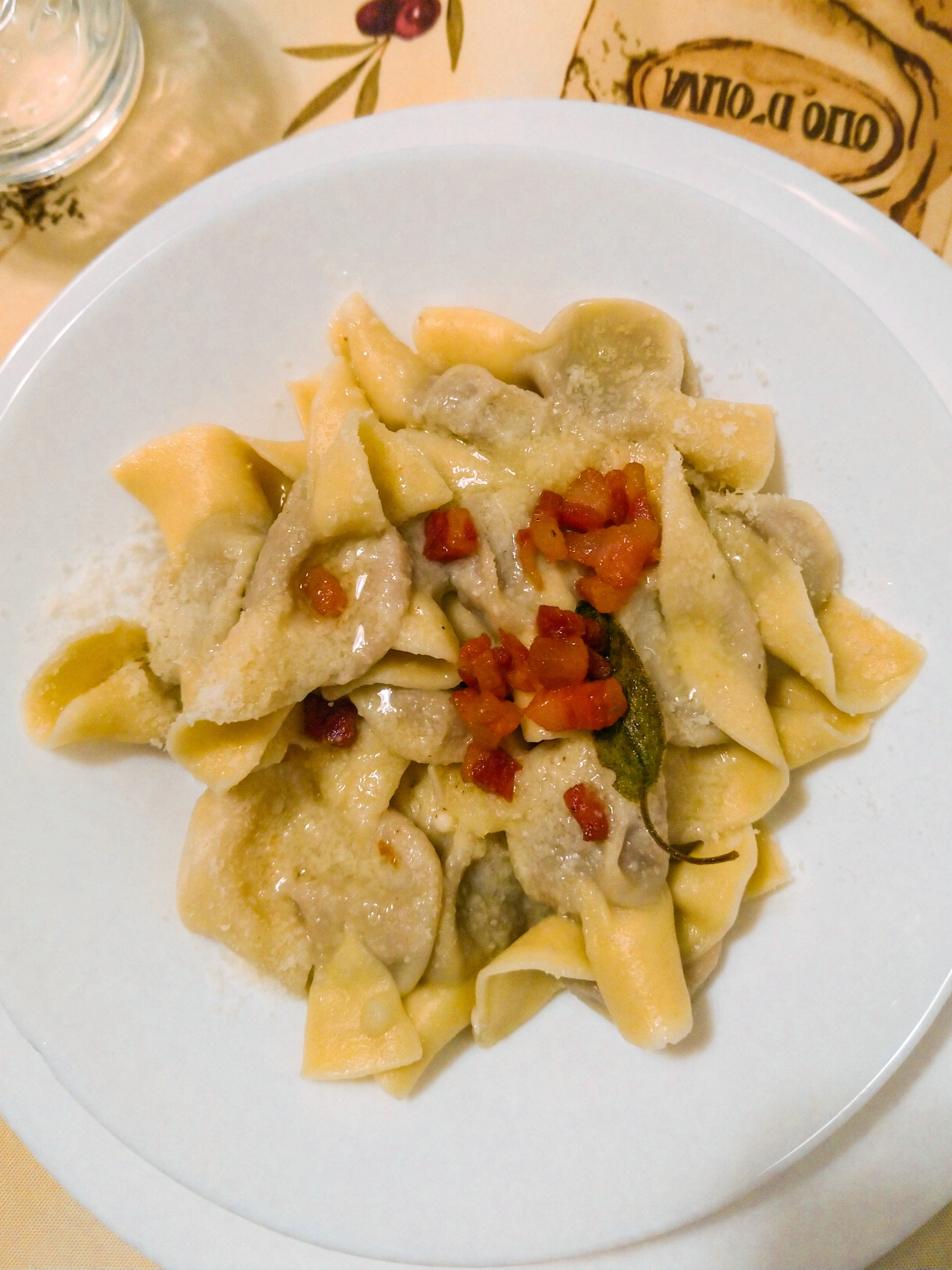 casoncelli alla bergamasca in una grande padella